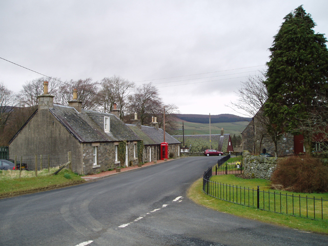 Drumelzier, Peeblesshire